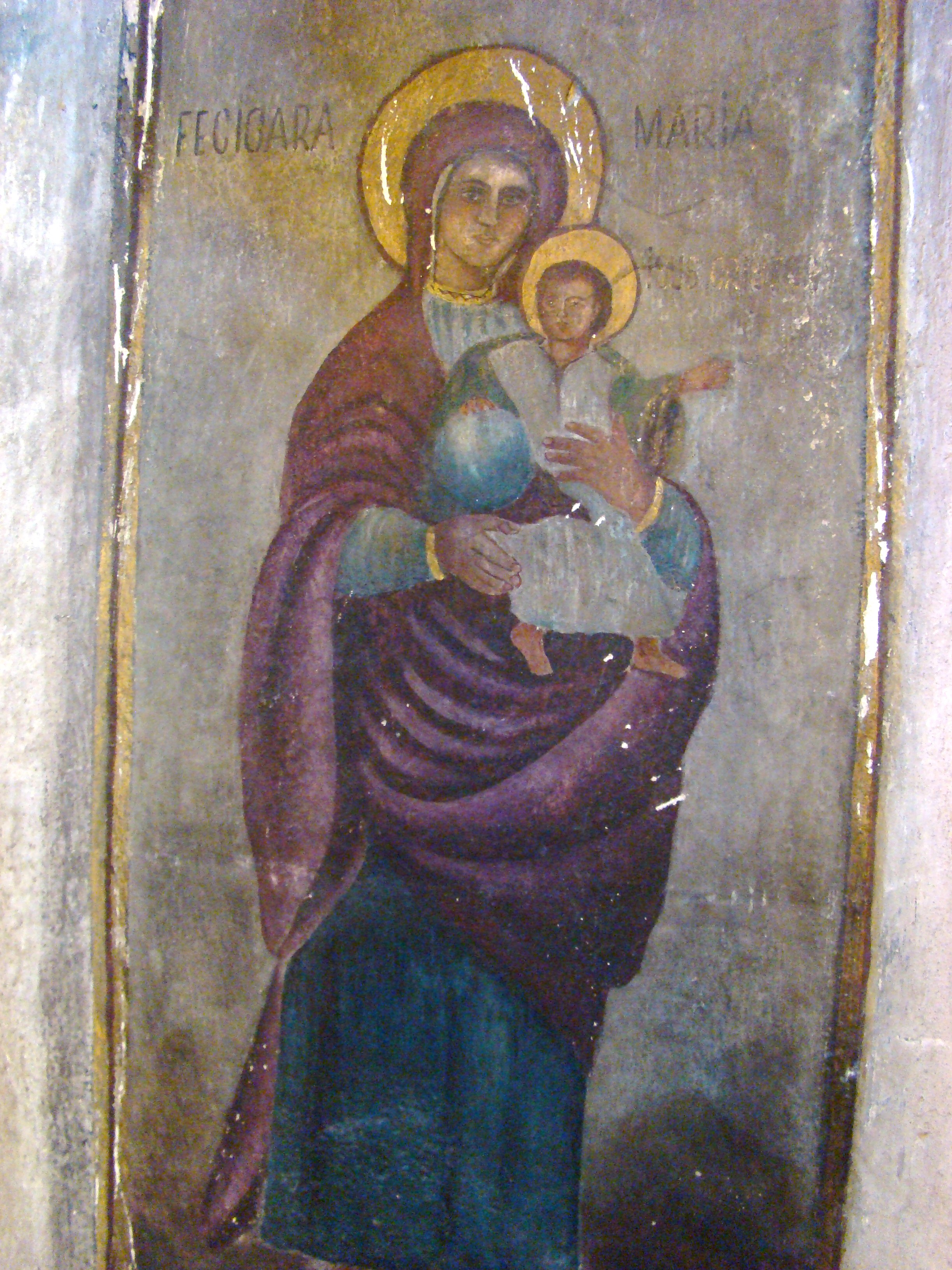 Biserica "Buna Vestire", sat ROŞCANI; comuna DOBRA